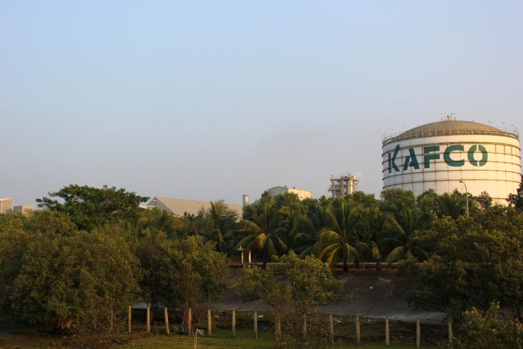 কাফকো প্লান্টের চিত্র।